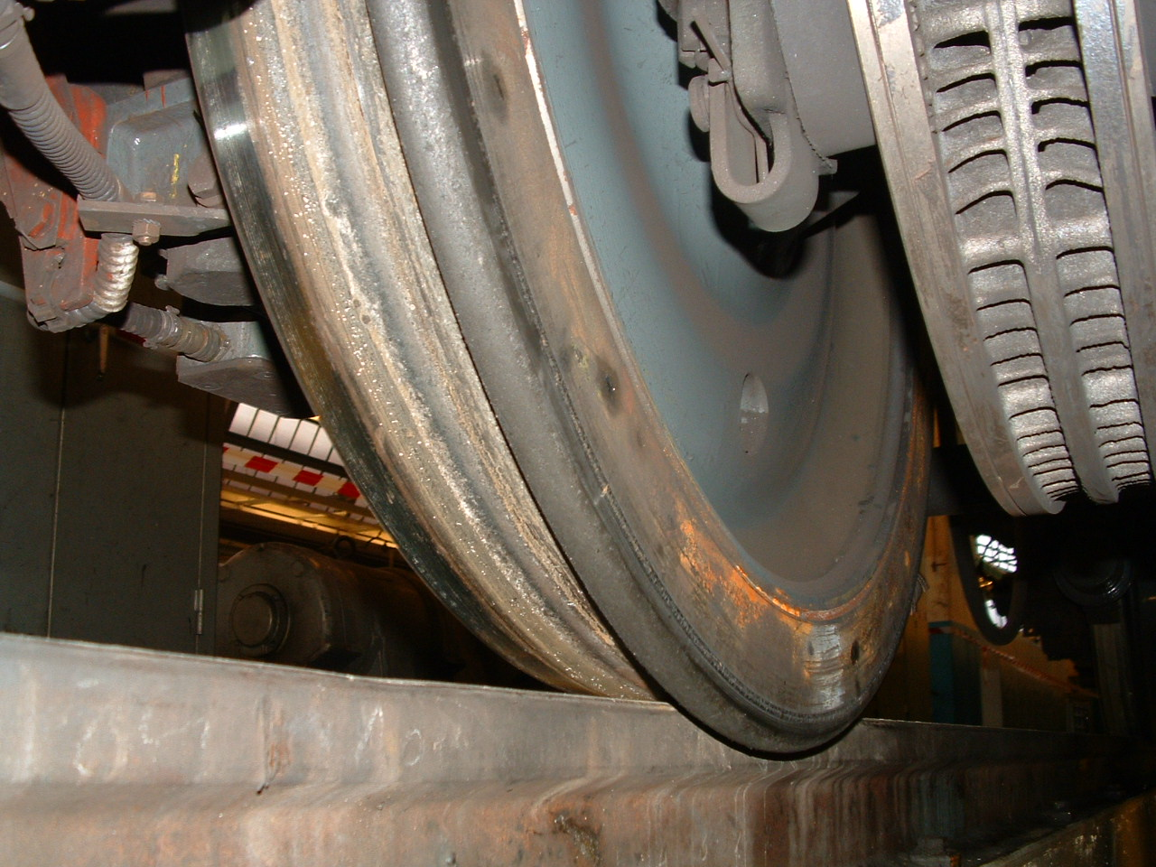 Roue d'un bogie de MF 77 vue du dessous du train.